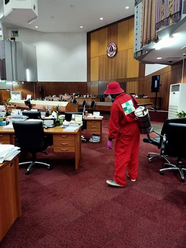 Desinfektion im Nationalparlament wegen COVID-19